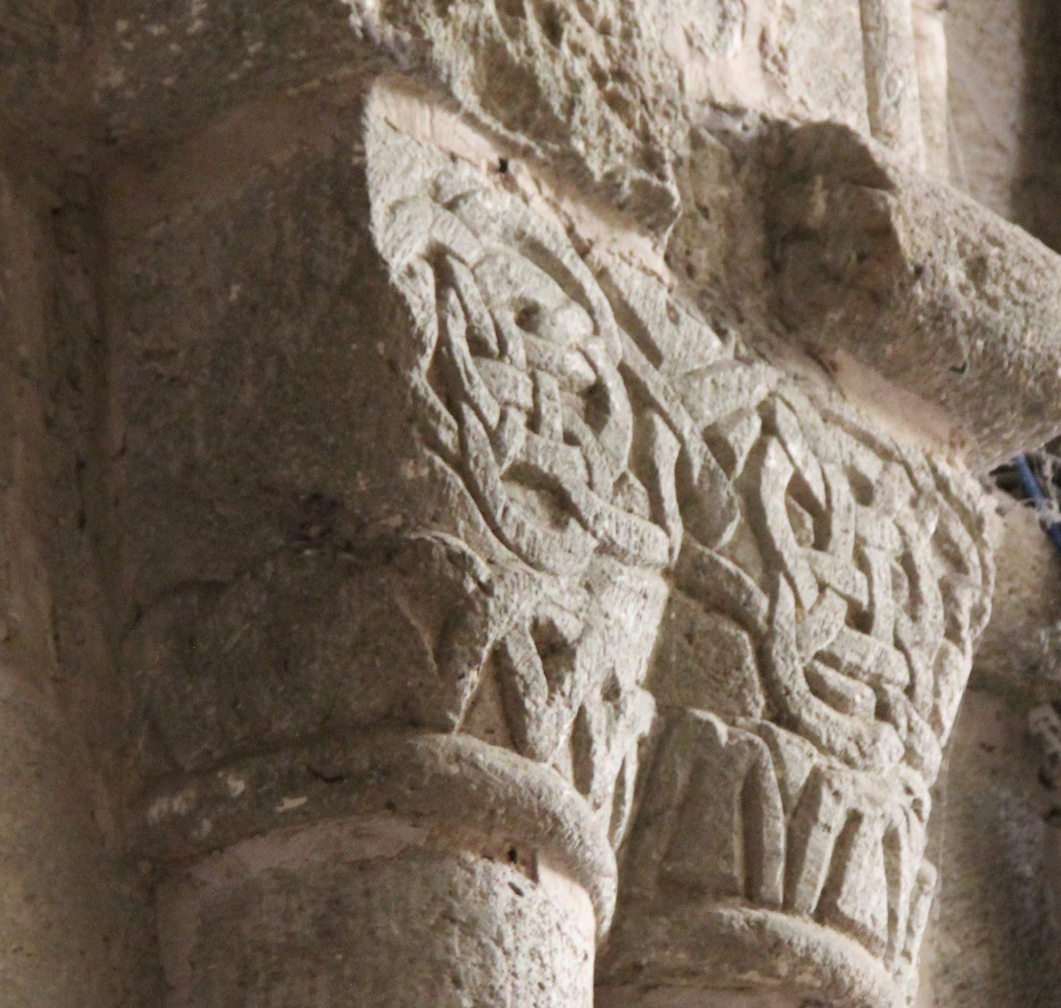 Kapiteel van een dubbele zuil in de kathedraal van St. Tugdual in Tréguier, met keltische motieven